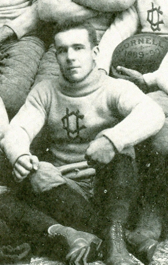 Winchester Osgood - 1889